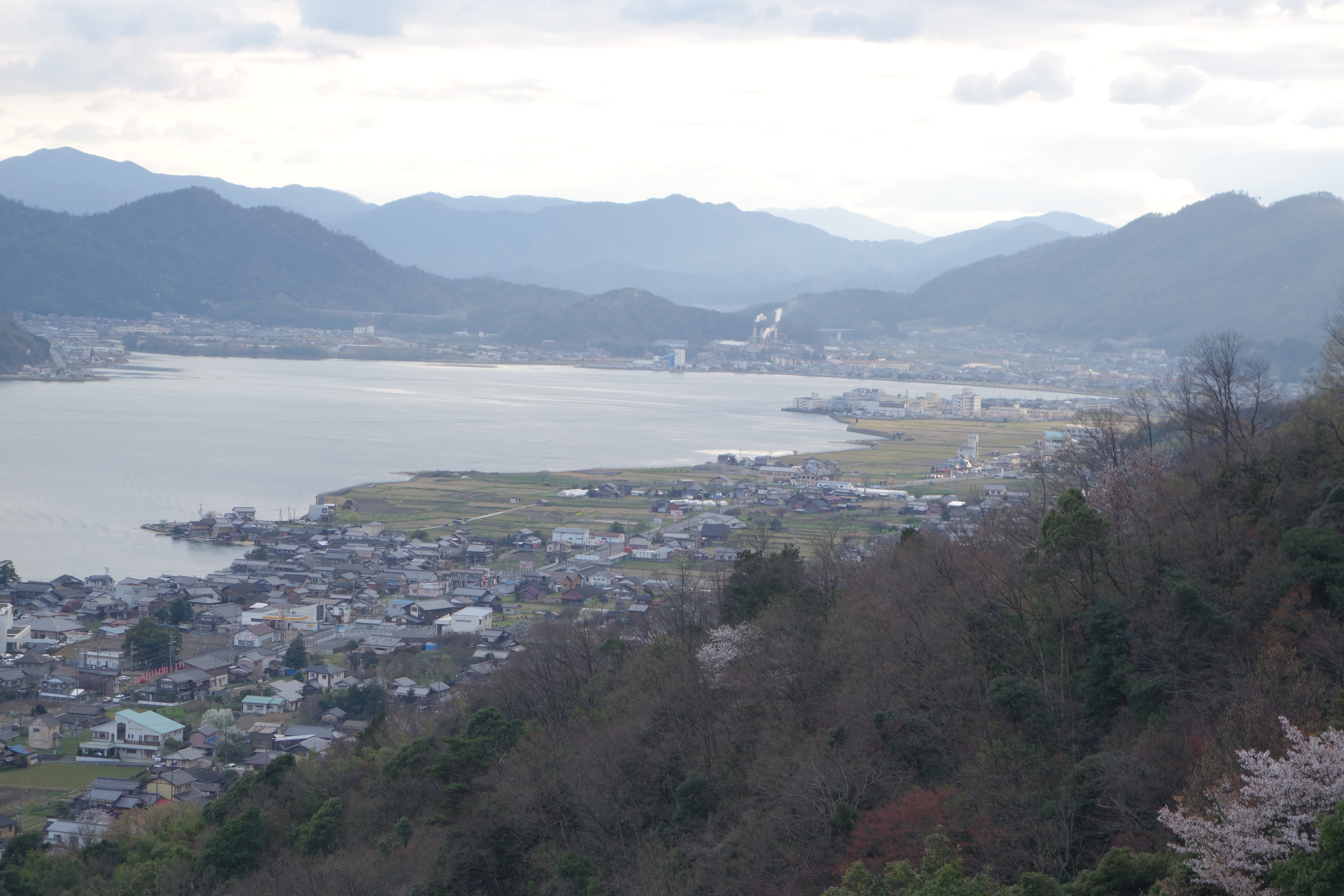 傘松ケーブル Kasamatsu-Cable ケーブルカー・リフト CableCar-Lift 天橋立 宮津 Amanohashidate Miyazu